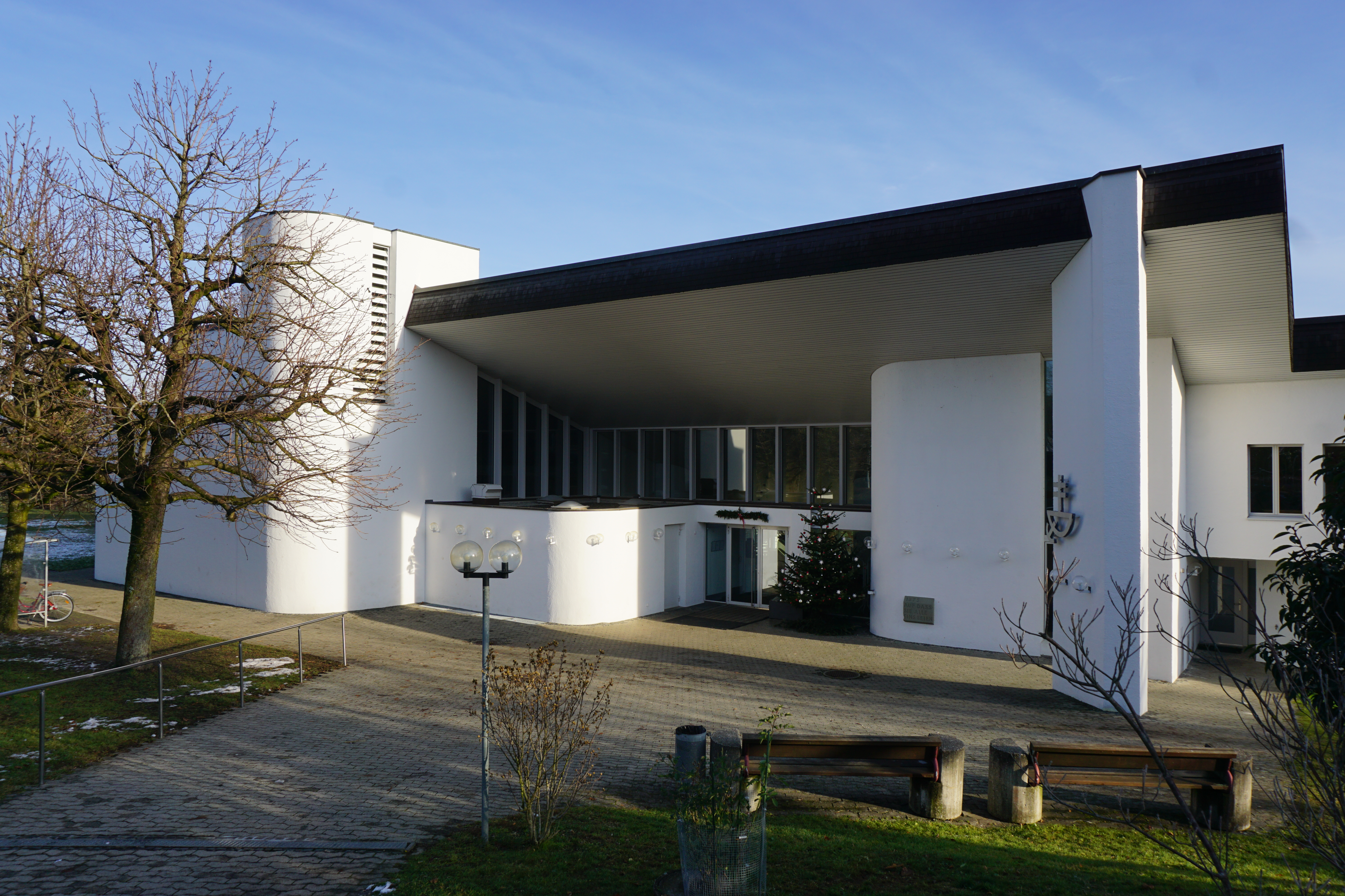 Oekumenisches Zentrum St. Andreas in Kehrsatz, Eingang